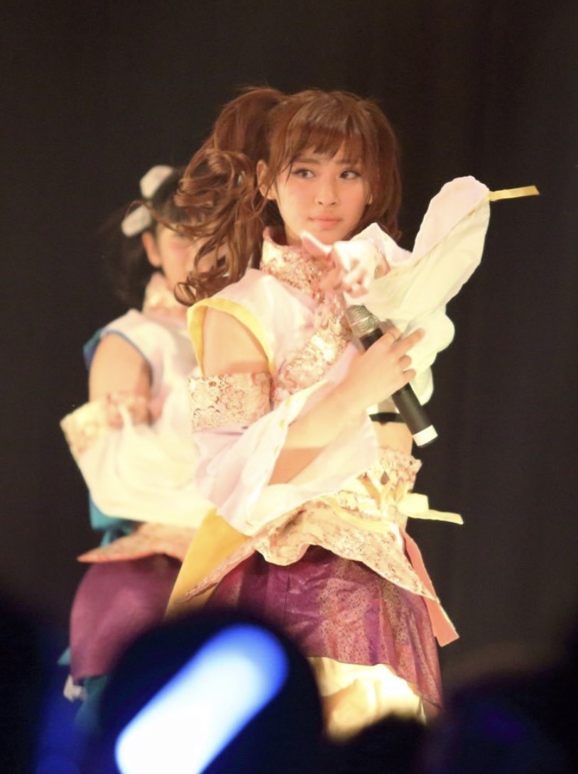 ライブにて